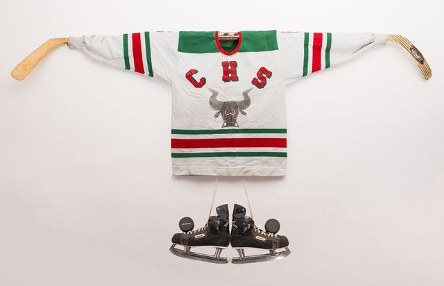 Camiseta oficial del CH Sevilla en las temporadas 1976/77 y 1977/78